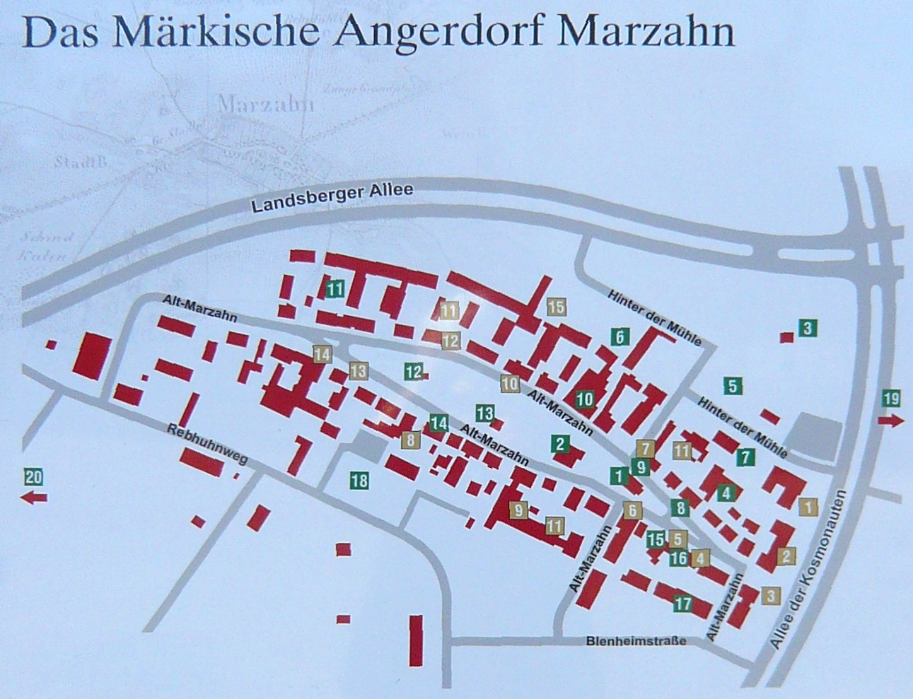 Ortsteil Marzahn, Lageplan Alt-Marzahn von einer öffentlichen Erklärungstafel